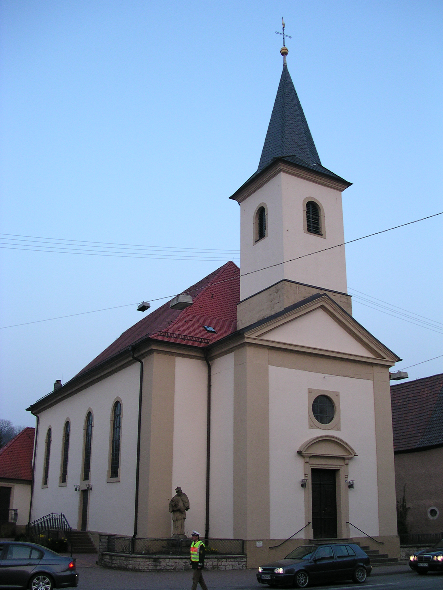 römisch-katholische Kirche in Sinsheim-Steinsfurt, 1803-1804 errichtet